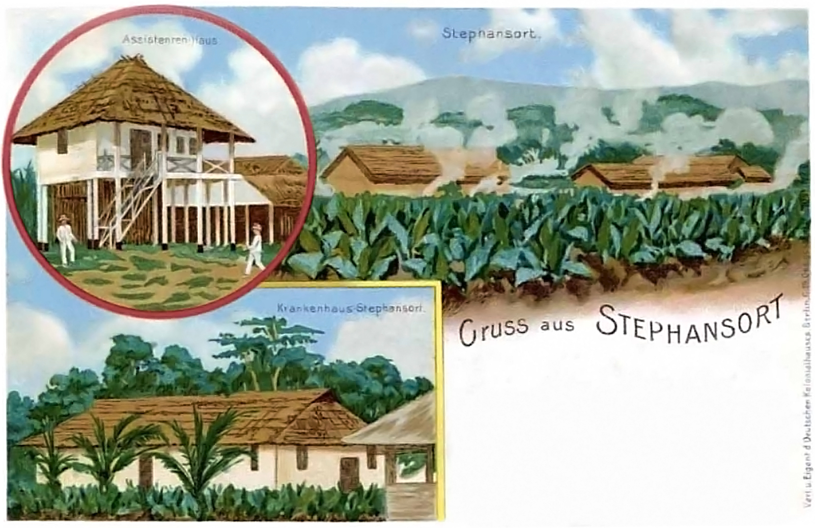 Postkarte aus Stephansort, einer im August 1888 gegründete, bedeutende Handelsstation der von privaten Investoren getragenen Neuguinea-Kompagnie. Die Postkarte zeigt Tabaksfelder für die Stephansort zunächst bekannt wurde. Im Jahr 1901 wurde die Tabakanpflanzung, die sich gegen die Konkurrenz nicht mehr durchsetzen konnte, in Stephansort endgültig aufgegeben.